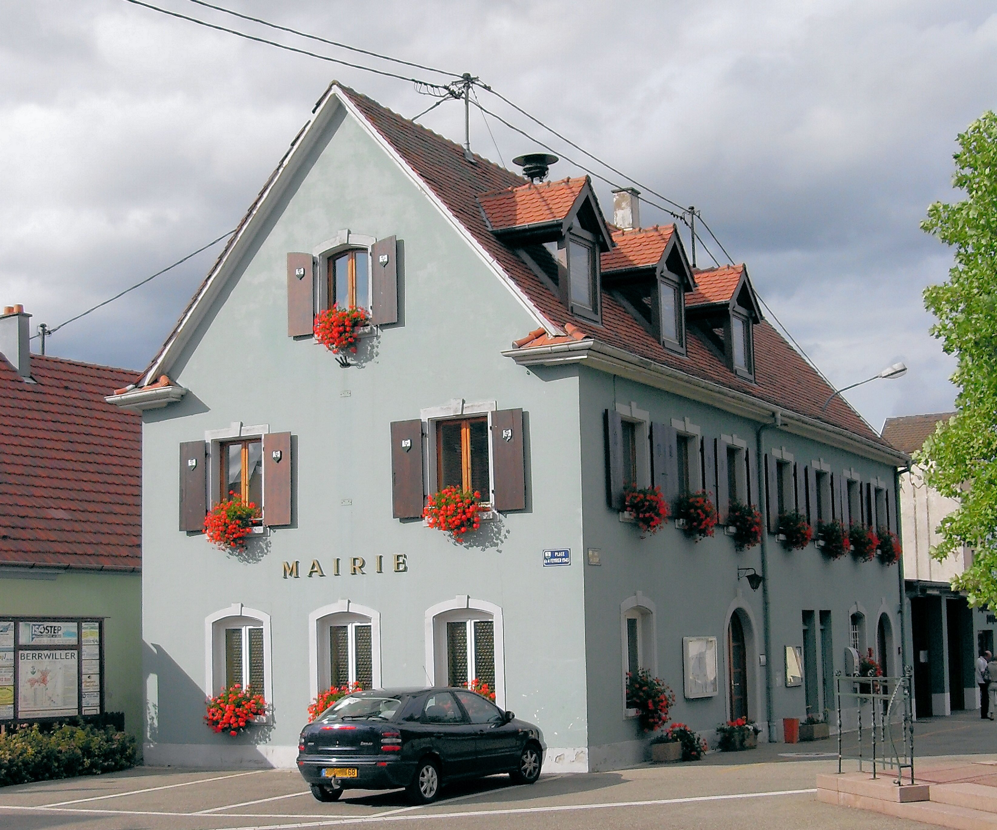 La mairie de Berrwiller